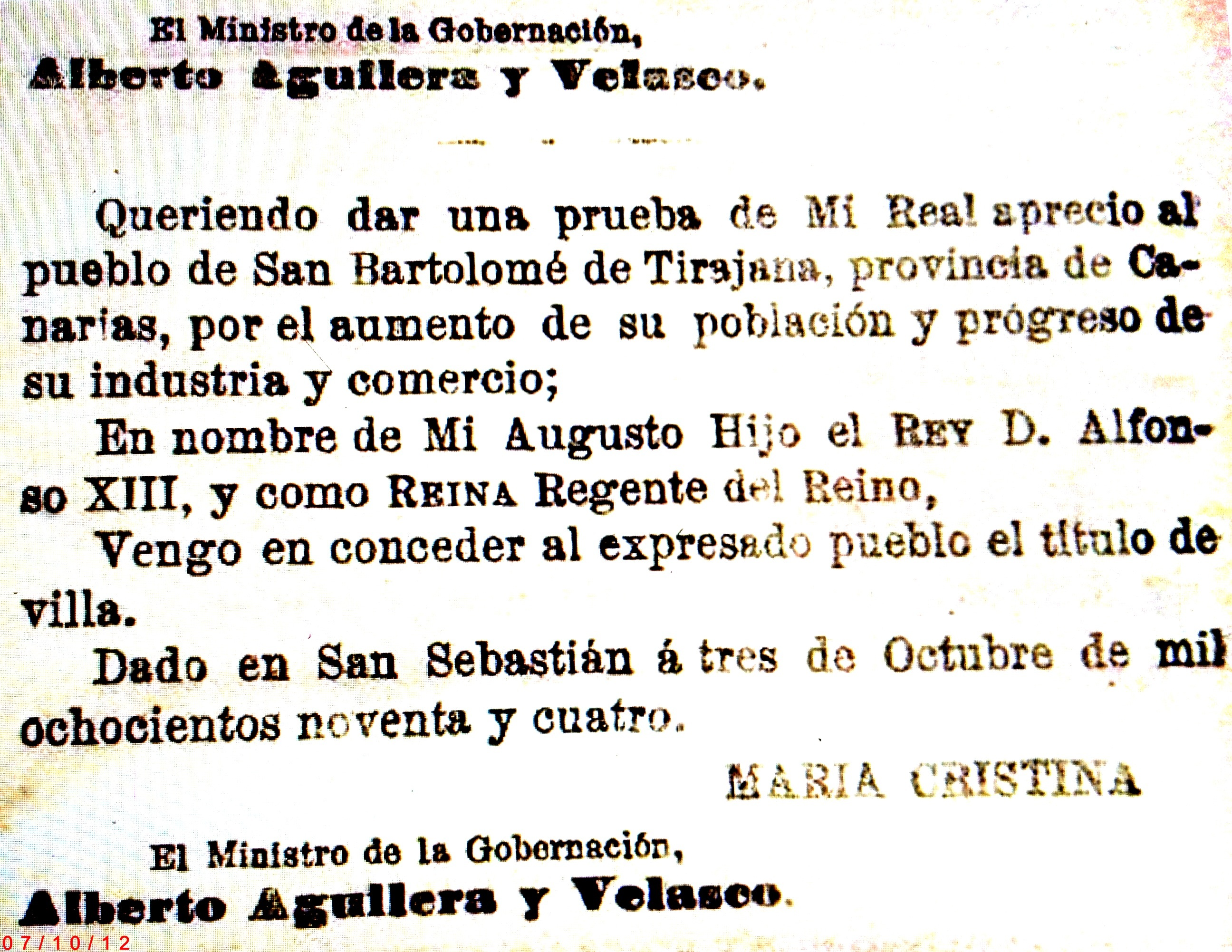 Titulo otorgado por la Reina Regente Maria Cristina en nombre de su hijo Alfonso XIII. Boletin Oficial del Estado: Concesion a San Bartolome de Tirajana del titulo de "Villa"